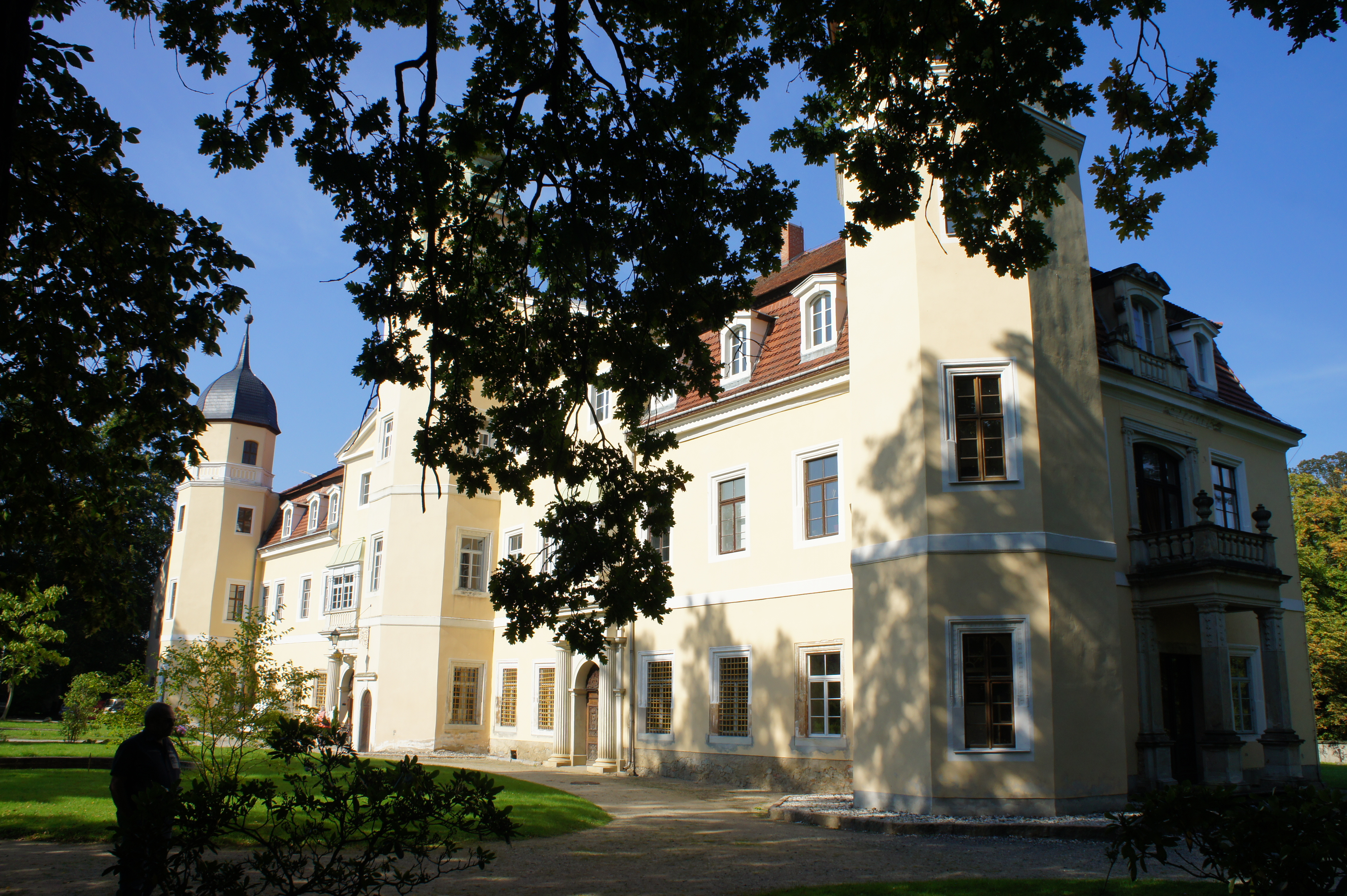 Schloss Hermsdorf wurde Mitte des 15. Jahrhunderts als Herrensitz durch Otto von Carlowitz gegründet. In Besitz u.a. von Kurfürst Christian II., Johann Georg II., Hofmarschall Georg Freiherr von Rechenberg, Adam Heinrich von Flemming und Prinz Georg von Schönburg-Waldenburg. Seit dem 2. Weltkrieg bis 1999 Seniorenheim, heutige Nutzung des Schlosses und des Parkes für Trauungen und kulturelle Veranstaltungen. Hier: Südseite